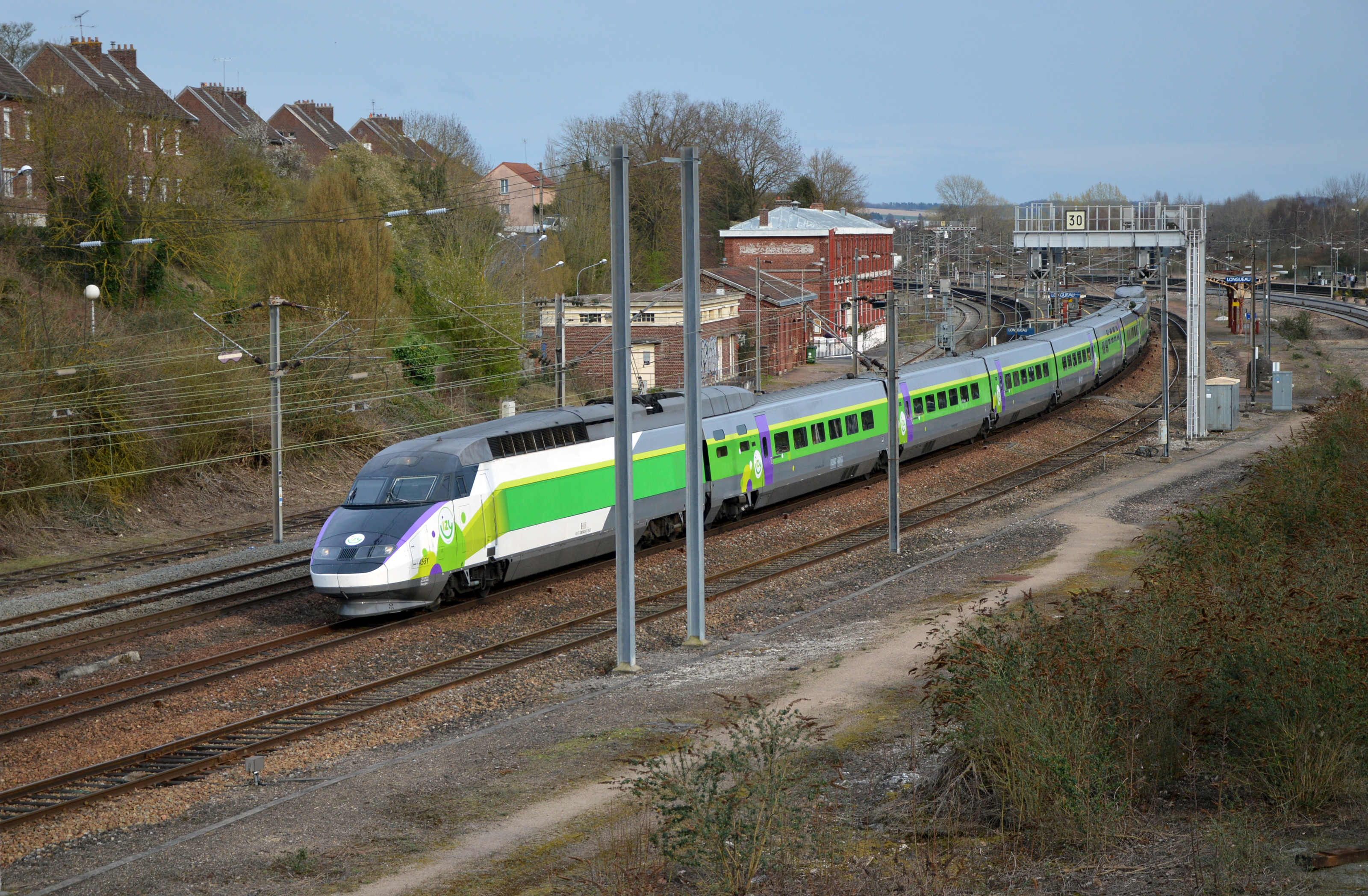 TGV IZY rame 4551 sur le 9611 Paris-Nord/Bruxelles, passant sans arrêt la gare de Longueau, département de la Somme, France.